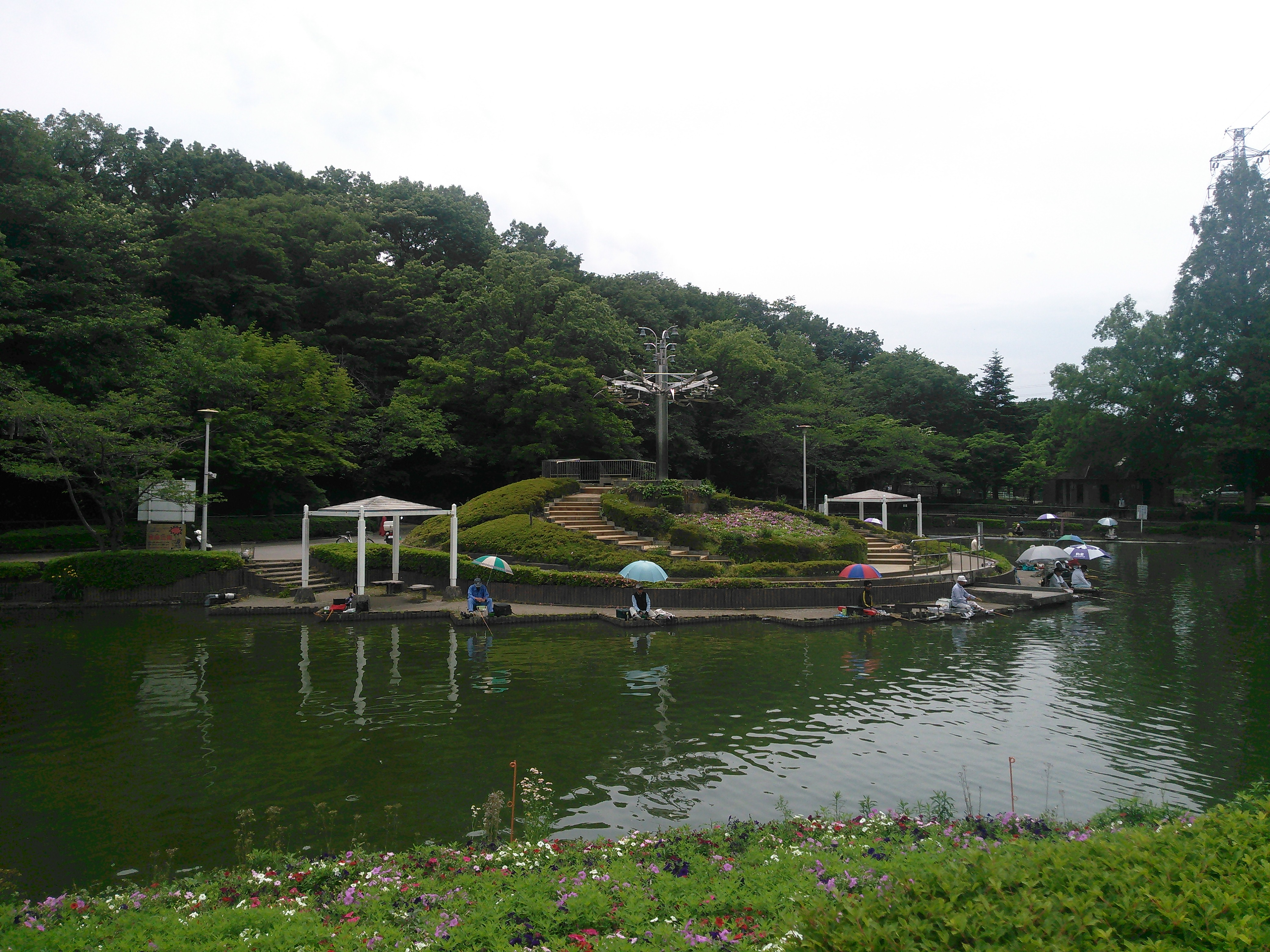 さいたま市緑区、さぎ山記念公園内の修景池